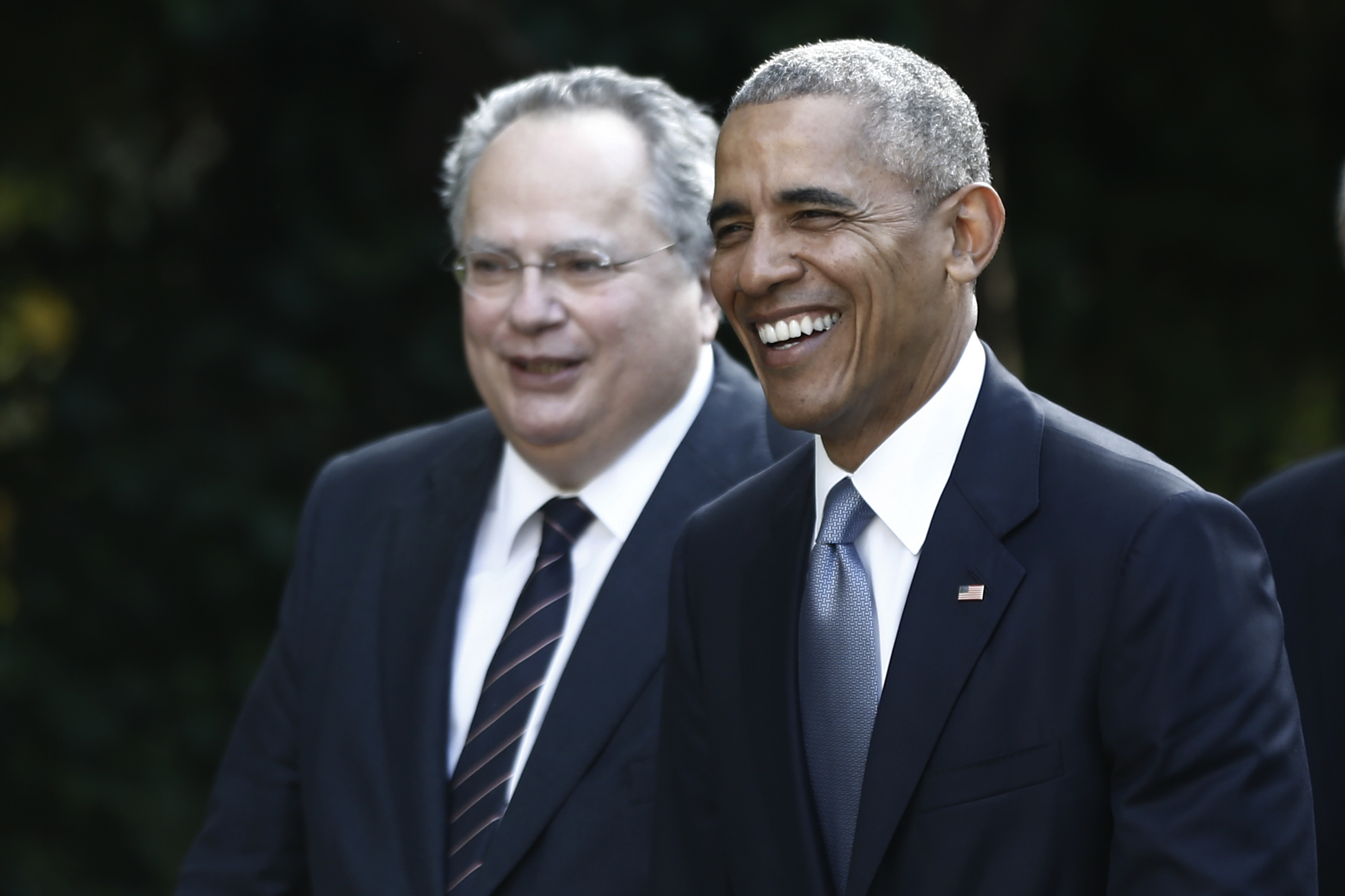 Ο Υπουργός Εξωτερικών κ. Ν. Κοτζιάς με τον Πρόεδρο των ΗΠΑ κ. B. Obama κατά την επίσκεψή του στην Αθήνα (15.11.2016).